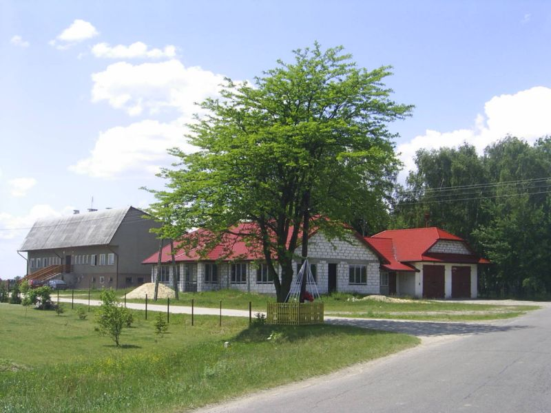 Tuliłów